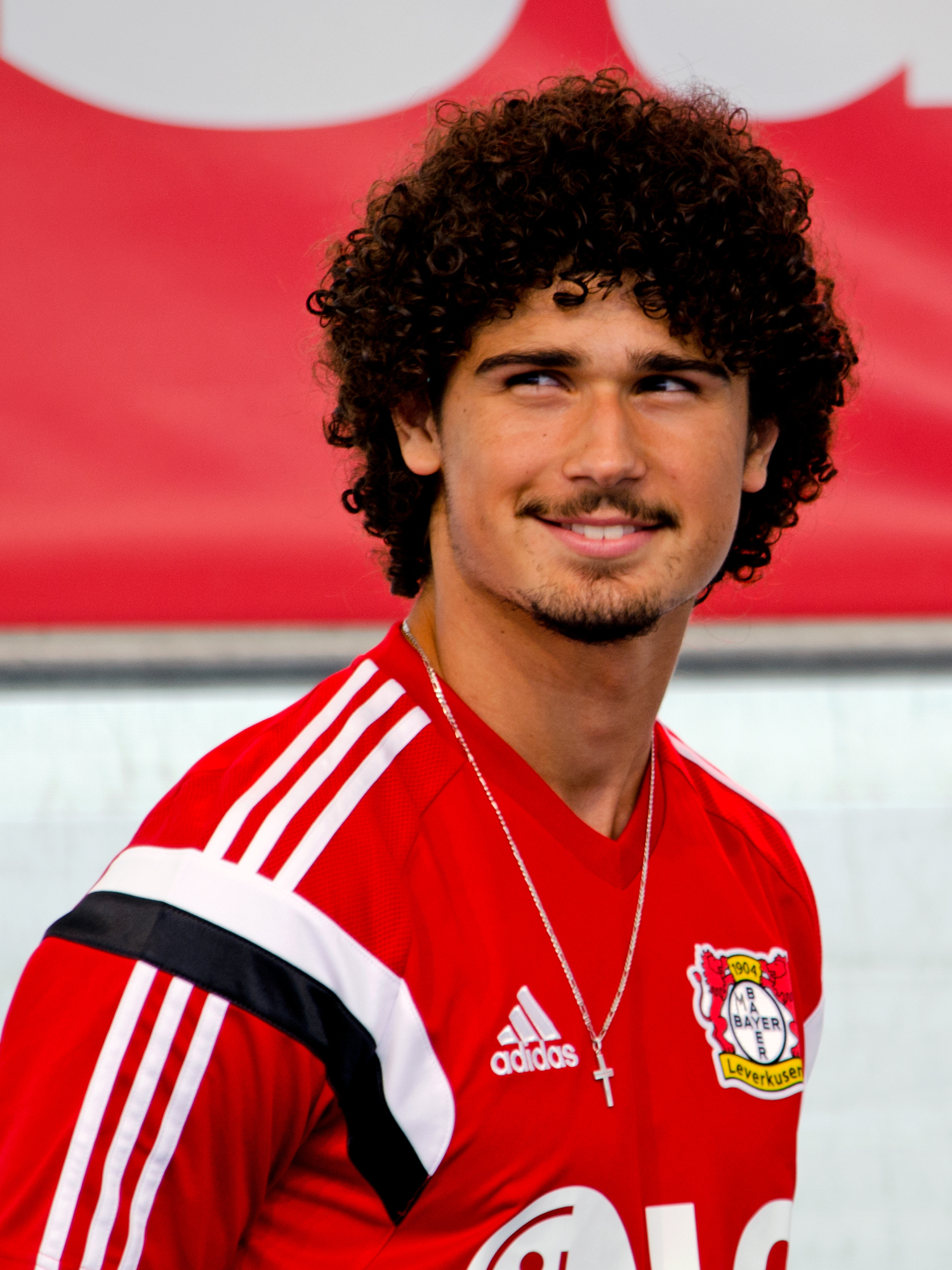 André Ramalho, brasilianischer Fußballspieler